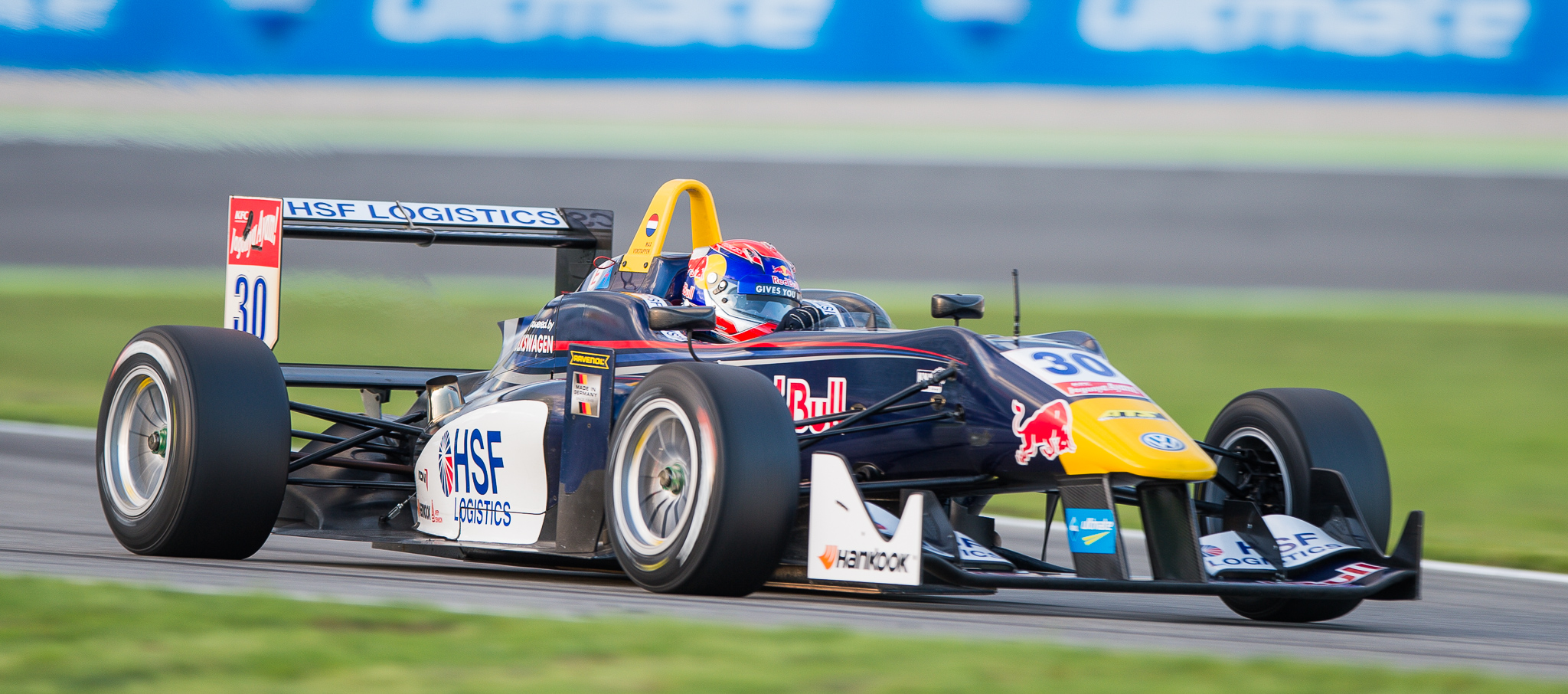 DTM,Dallara F312,Deutsche Tourenwagen Masters,F3 FIA European Championship,FIA Formel 3 Europameisterschaft,Hockenheimring,Max Verstappen,Motorsport,Van Amersfoort Racing,Volkswagen